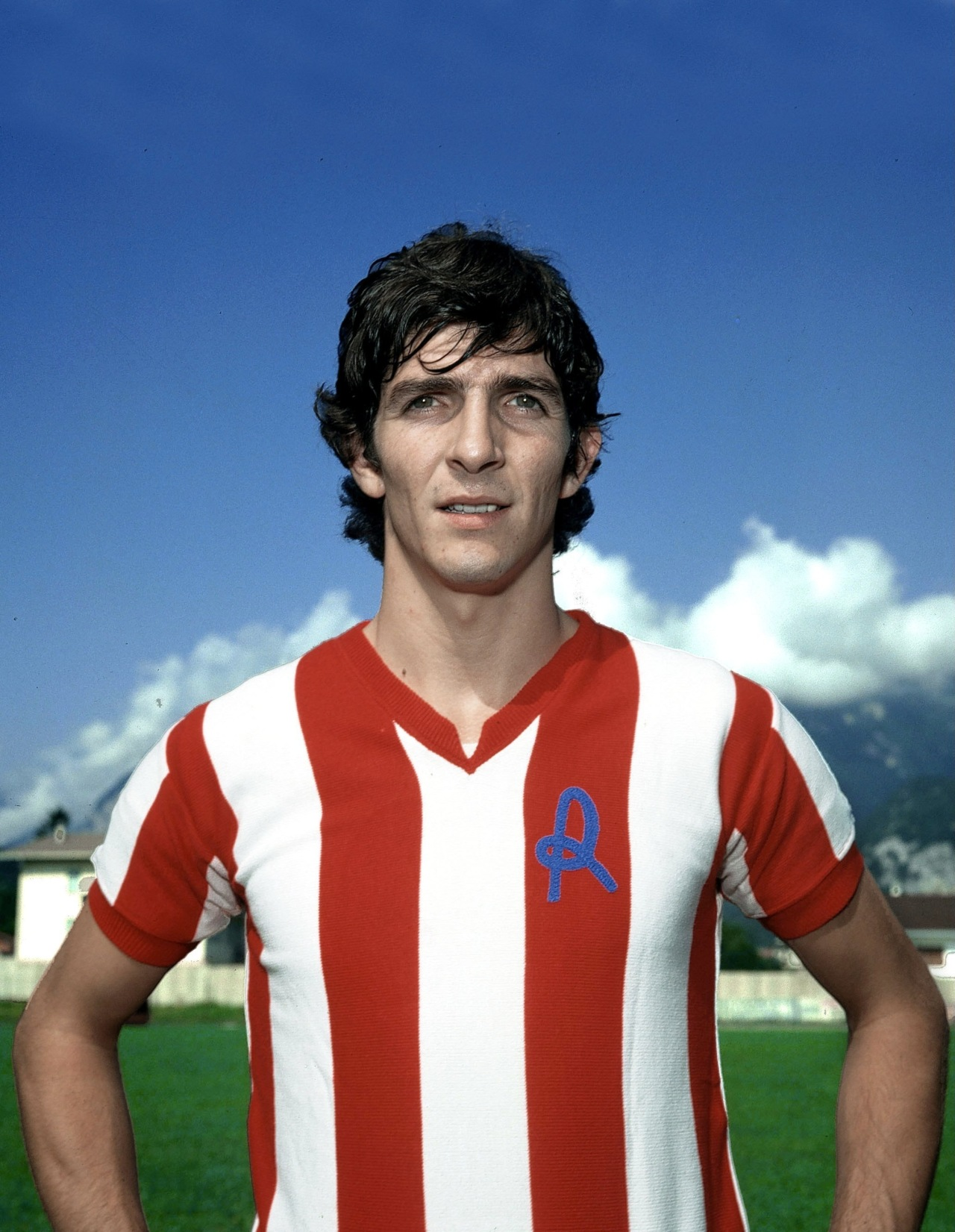 Paolo Rossi durante il periodo al Lanerossi Vicenza. Licensing Rossi, Paolo Categoria:Immagini di Paolo Rossi